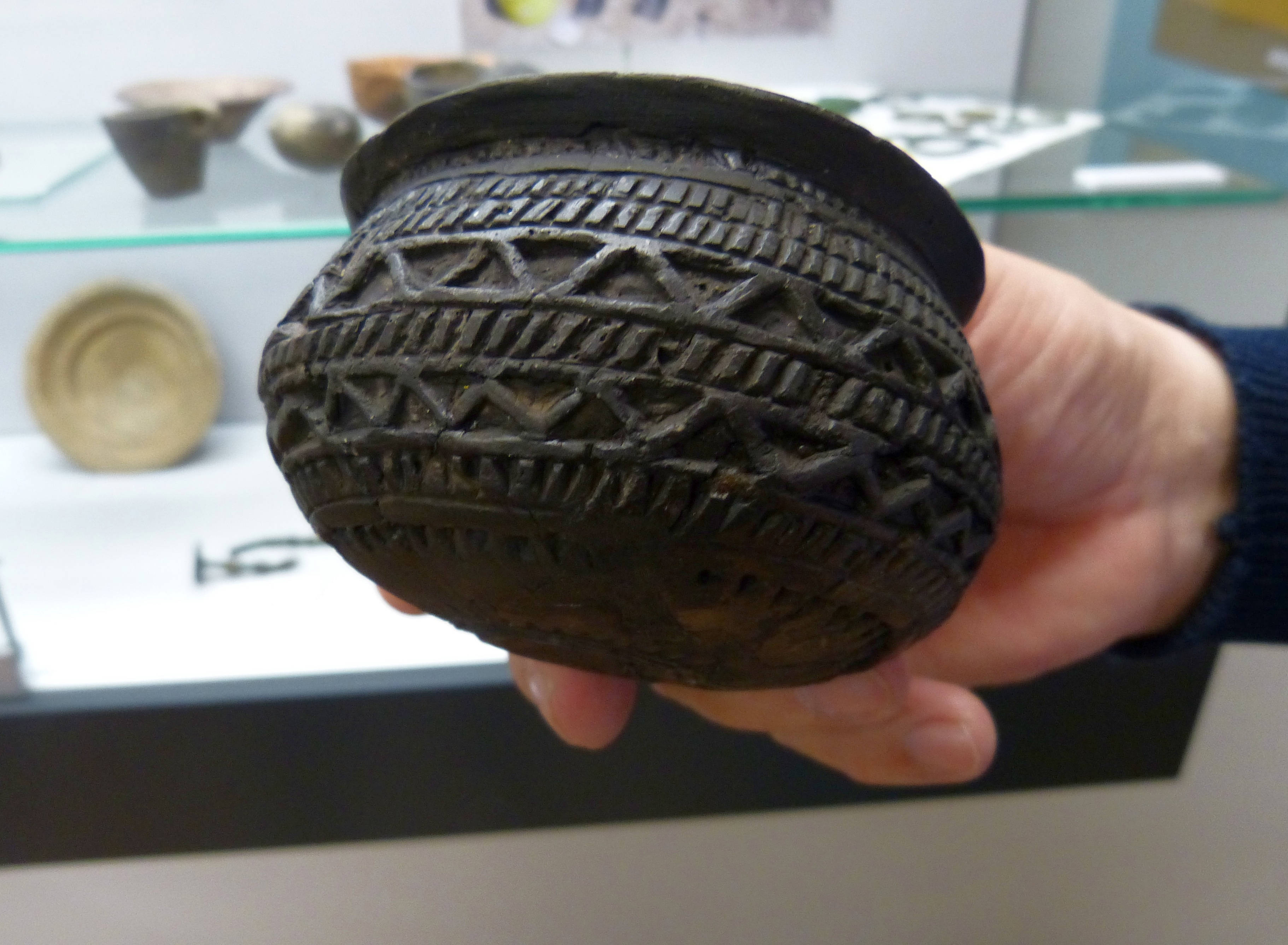 Archäologisches Museum Königsbrunn, reich verziertes Keramikgefäß der späten Bronzezeit.